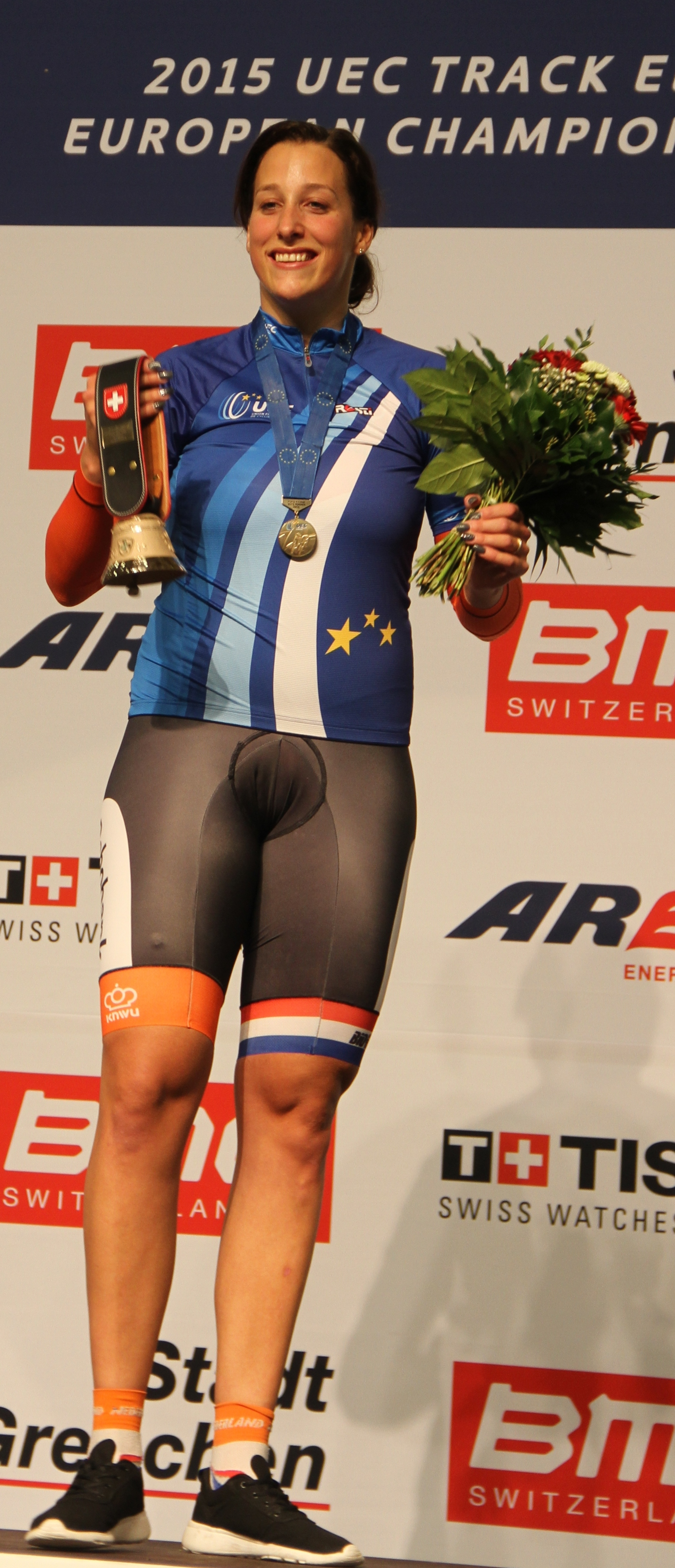 Elis Ligtlee, niederl. Radsportlerin, Europameisterin im Sprint The making of this document was supported by the Community-Budget of Wikimedia Germany.